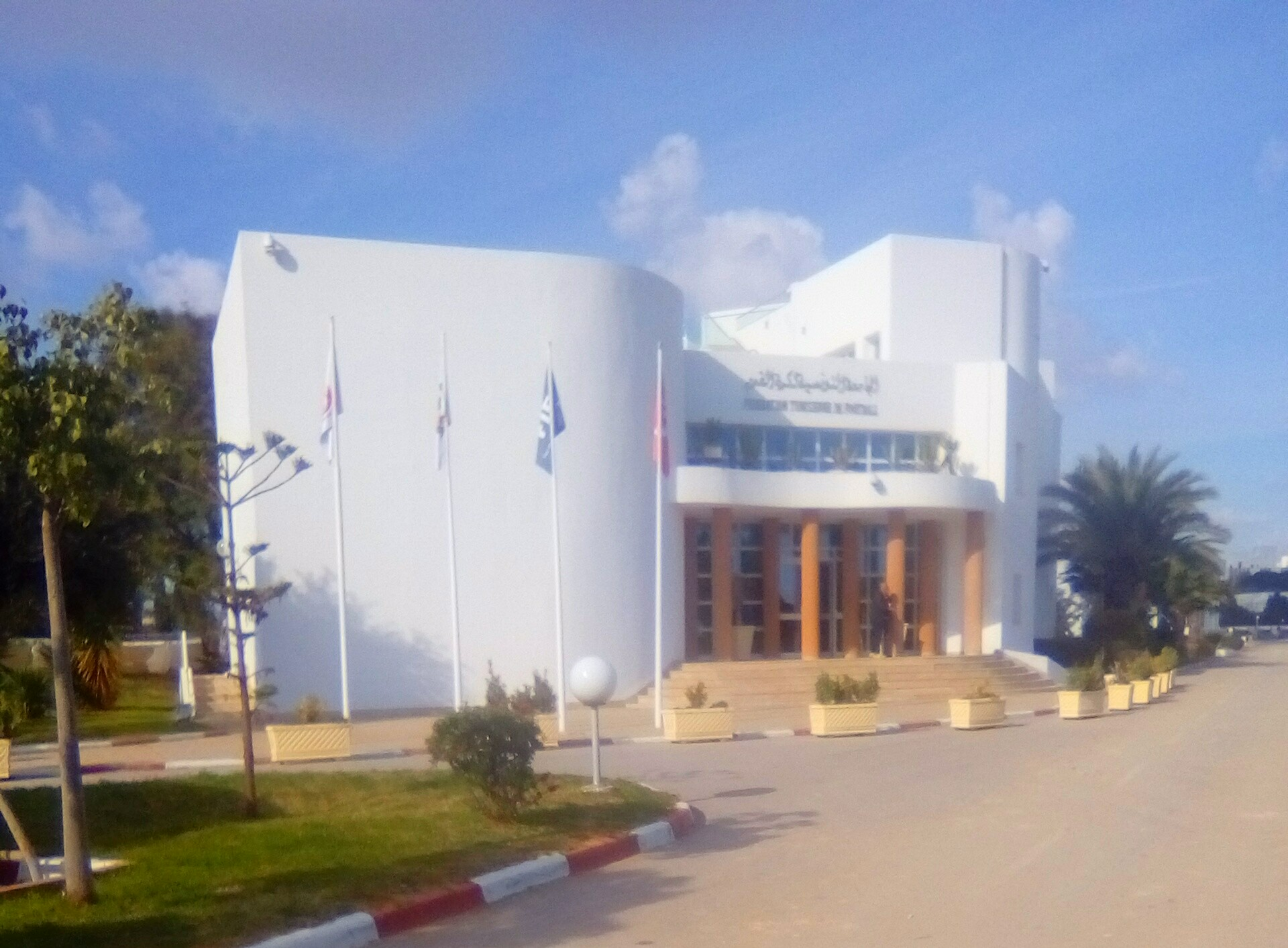 مقر الجامعة التونسية لكرة القدم